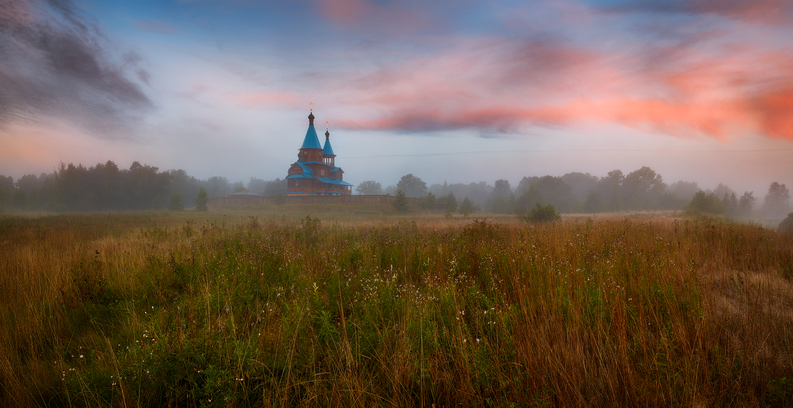 Крутовский заказник: Физико-географическая страна - Восточно-Европейская равнина, зона – смешенных лесов, ландшафт - Мещёрская низменность, юг Петушинского района, правобережная пойма Клязьмы, Петушинский район, Владимирская область This image is related to the protected area of Russia number 3310173